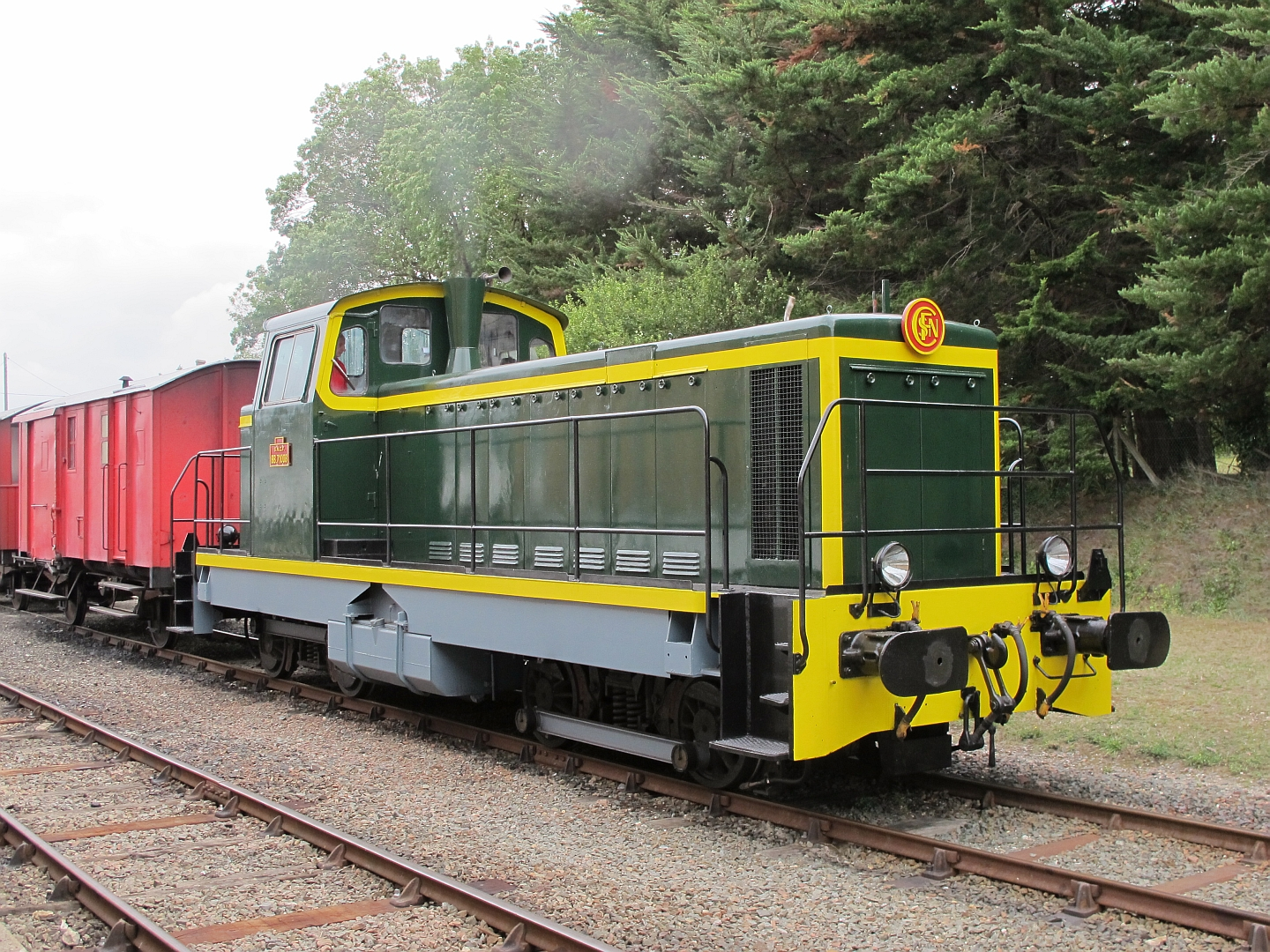 La BB 71008 du Train des Mouettes en gare de Chaillevette le 18 septembre 2016.